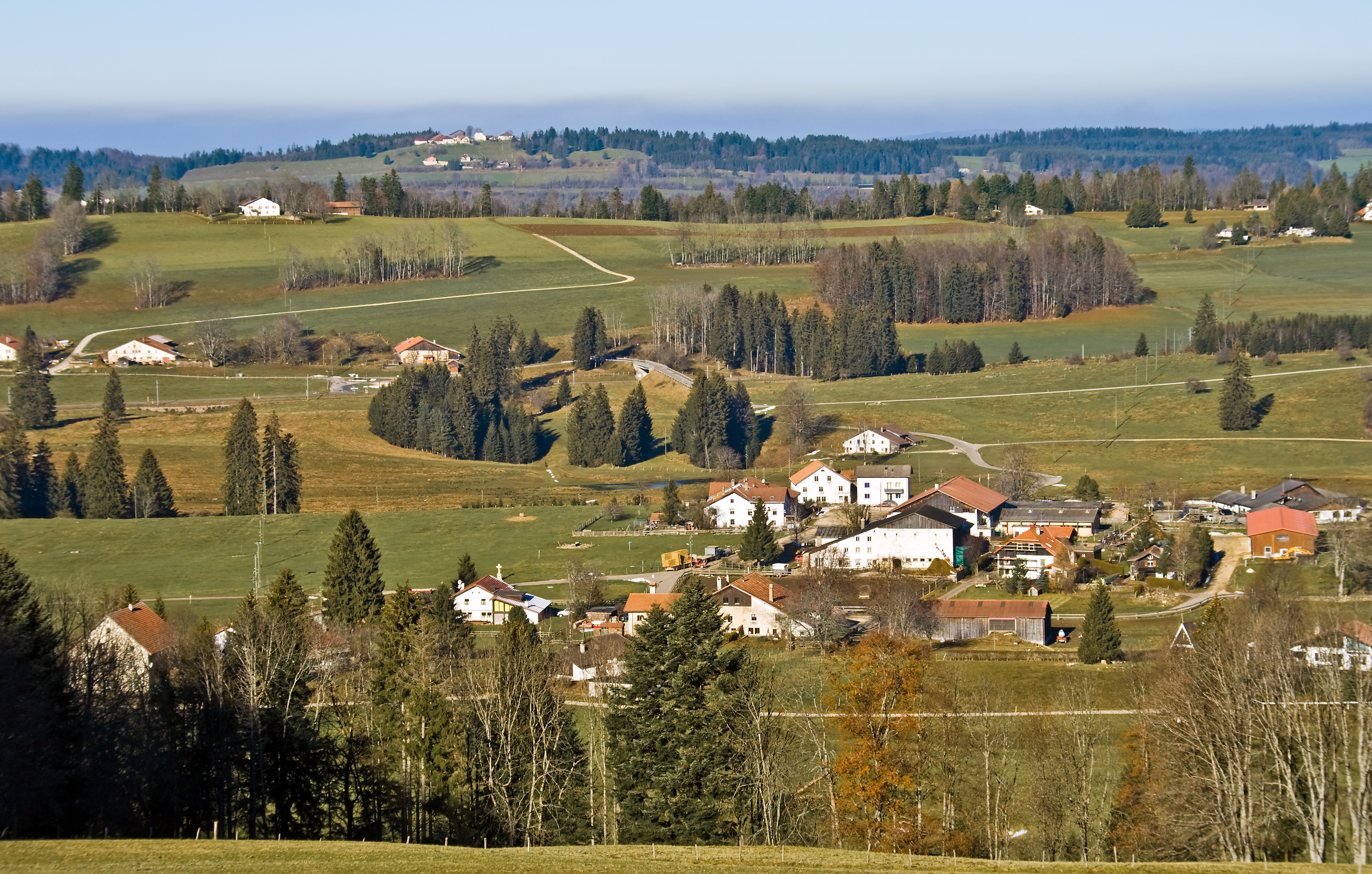 Le Peu-Péquignot ist ein Weiler der Gemeinde Le Noirmont in den Freibergen, Schweiz, Kanton Jura.